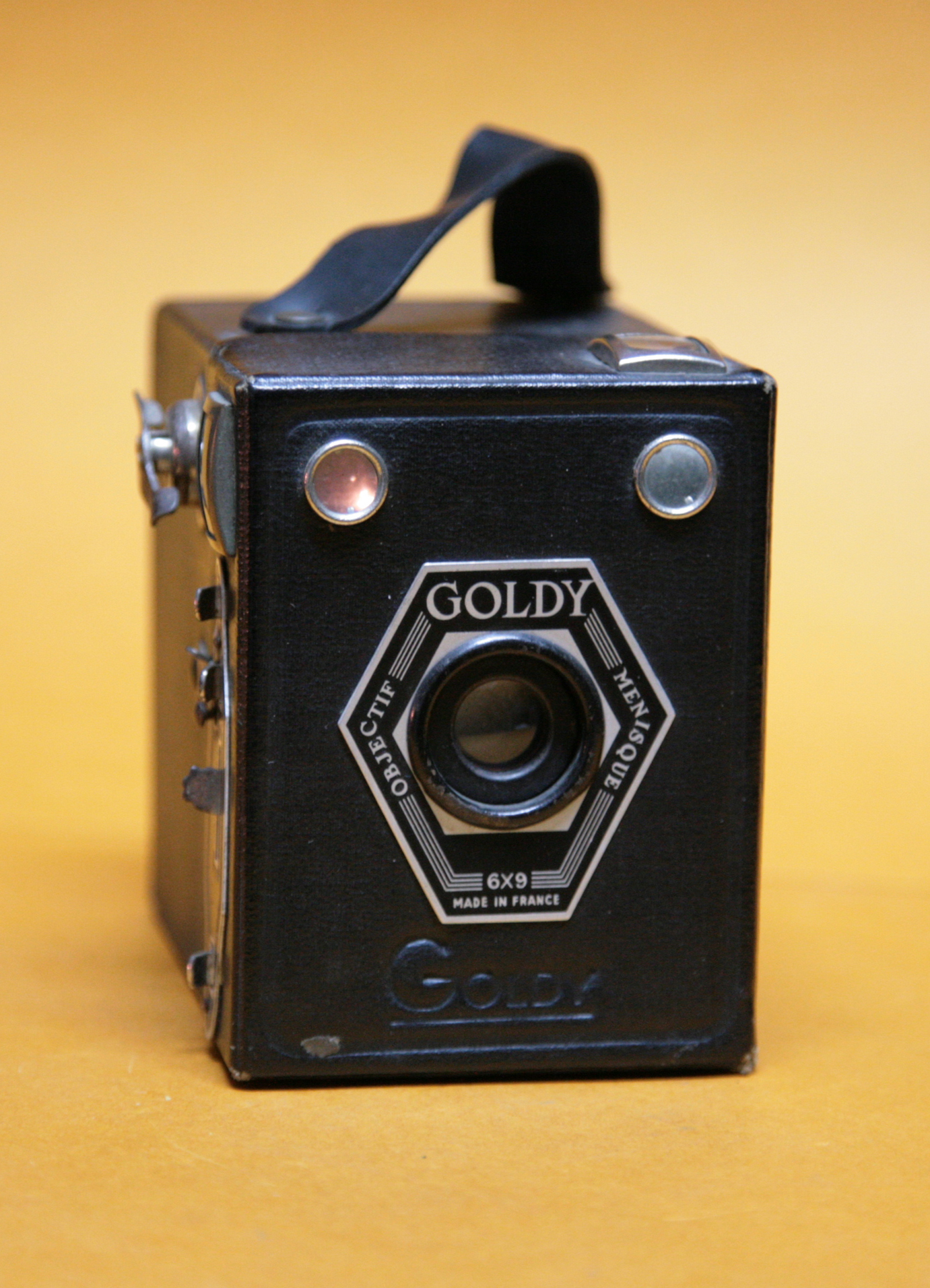 Coll. Marcè CL - Goldy objectif menisque (Garci80) fabbricata in Francia 1939 - 1940